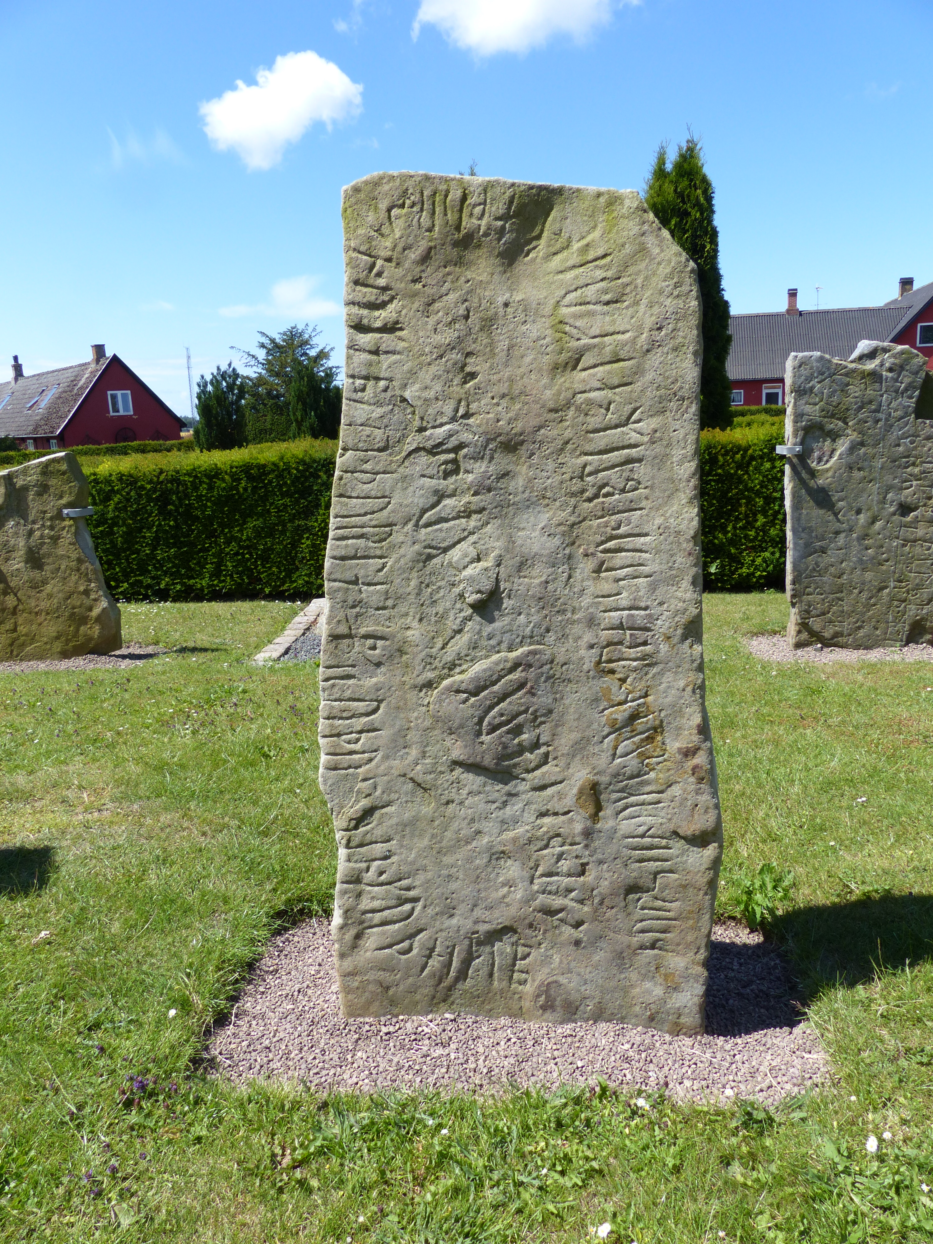 Bornholm, Vestermarie Kirkegaard, Runesten, Alvins sten (Vestermarie-sten 2)